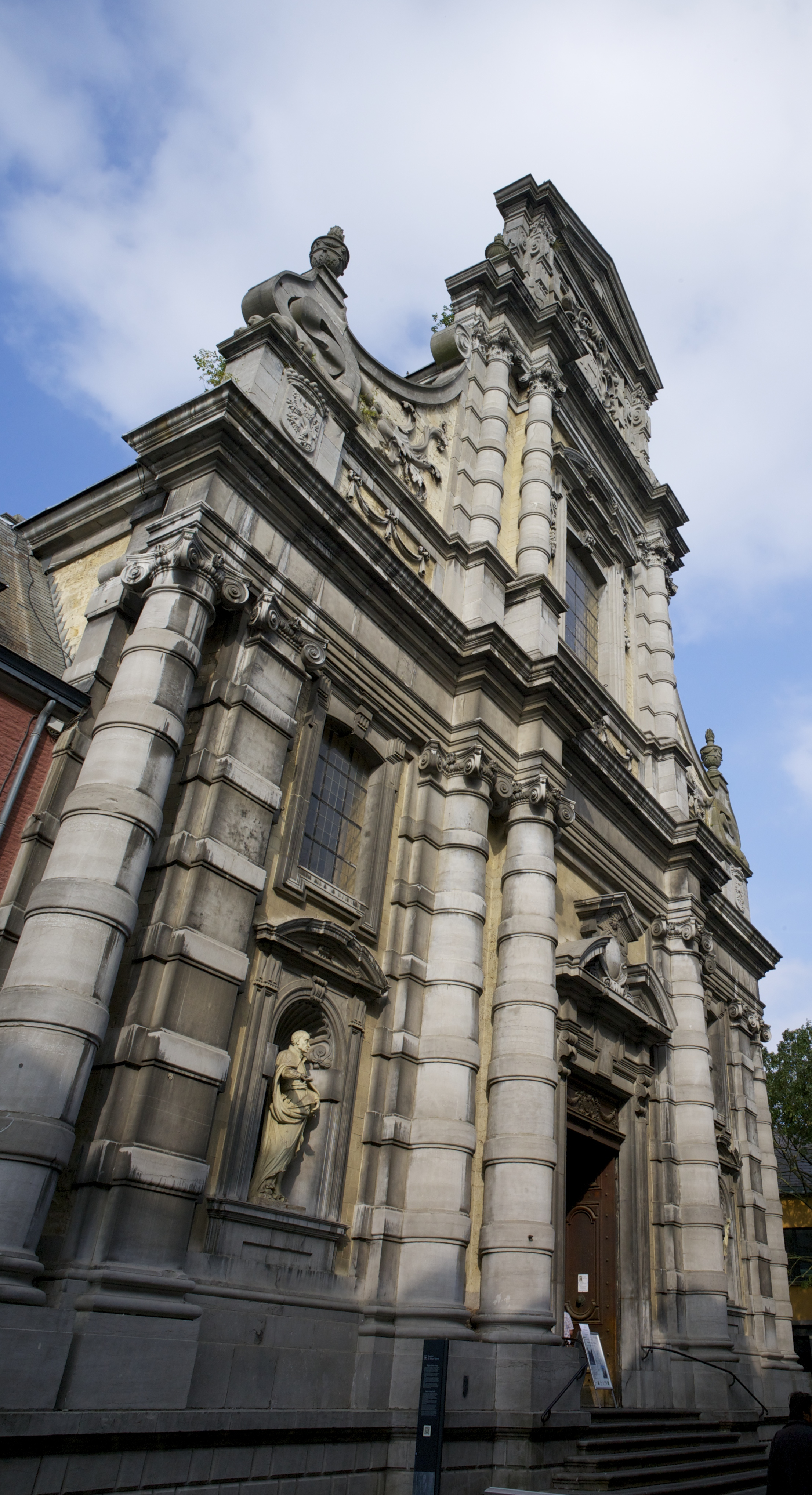 Eglise Saint-Loup, extérieur, Namur, Wallonie, Belgique